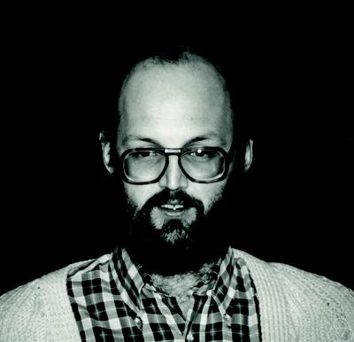 Foto di Peter Jones